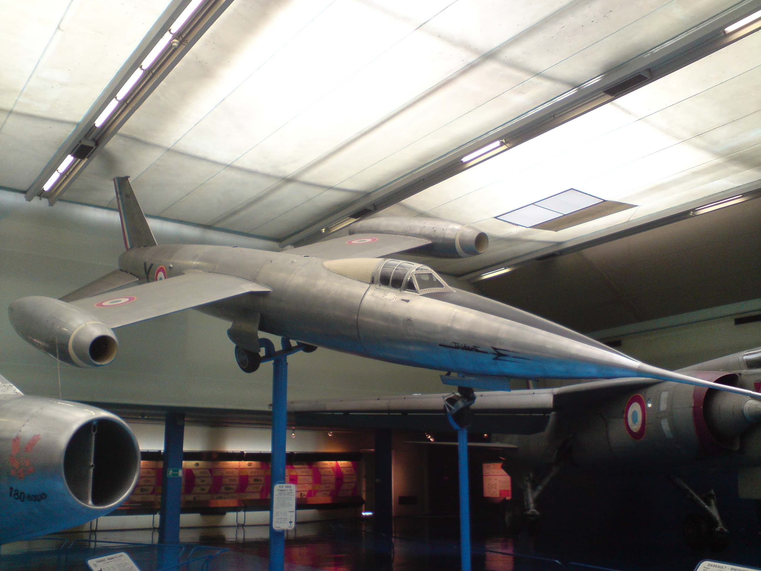 Le SO.9000 Trident, jet expérimental combinant deux turboréacteurs en bout d'aile avec un moteur-fusée.